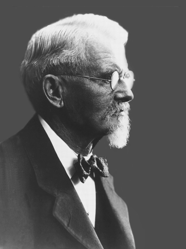 Wilhelm Maybach (* 9. Februar 1846 in Löwenstein; † 29. Dezember 1929 in Stuttgart-Cannstatt) war ein deutscher Autokonstrukteur und Unternehmer.